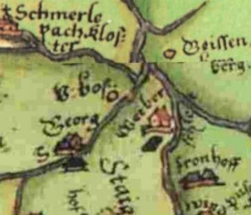 Ausschnitt aus einer historischen Karte des Spessarts mit den Orten Weiber (Weyber, Weiberhof) Schmerlenbach, Fronhofen